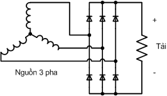 Übliche Schaltung eines Drehstromgleichrichter.